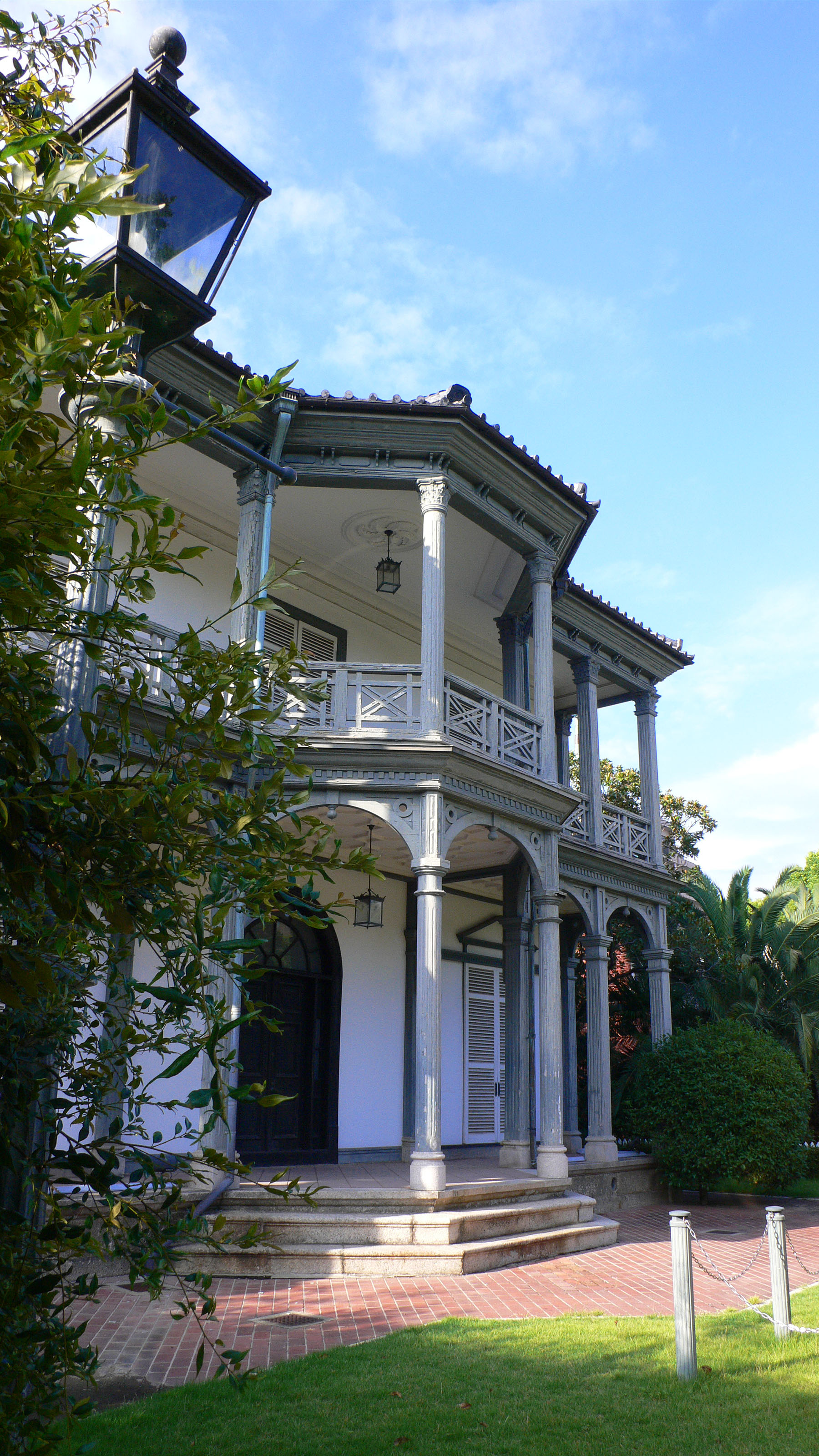 "Hassam House" in Sorakuen, Kobe, Hyogo, Japan